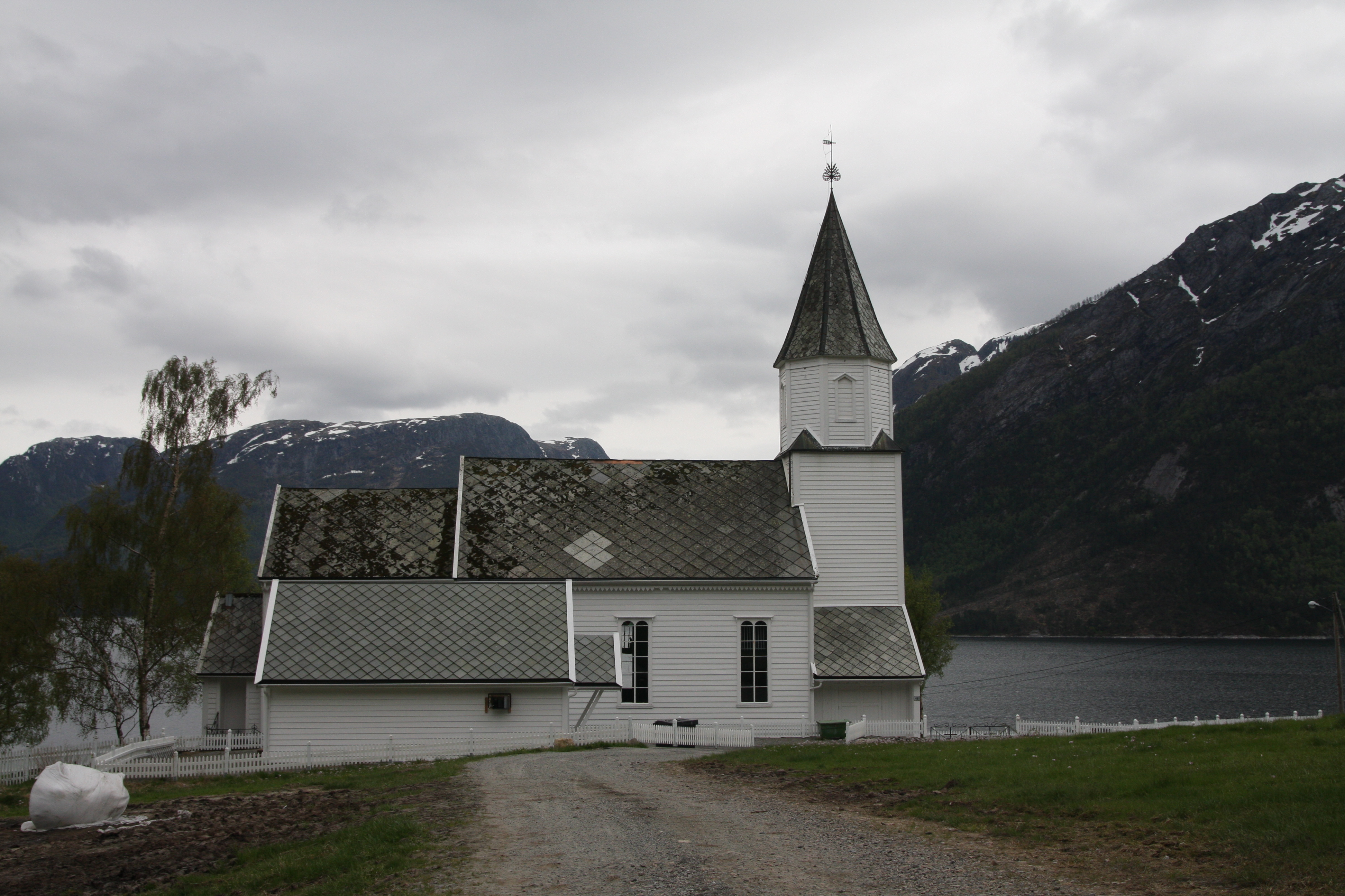 Solheim kirke